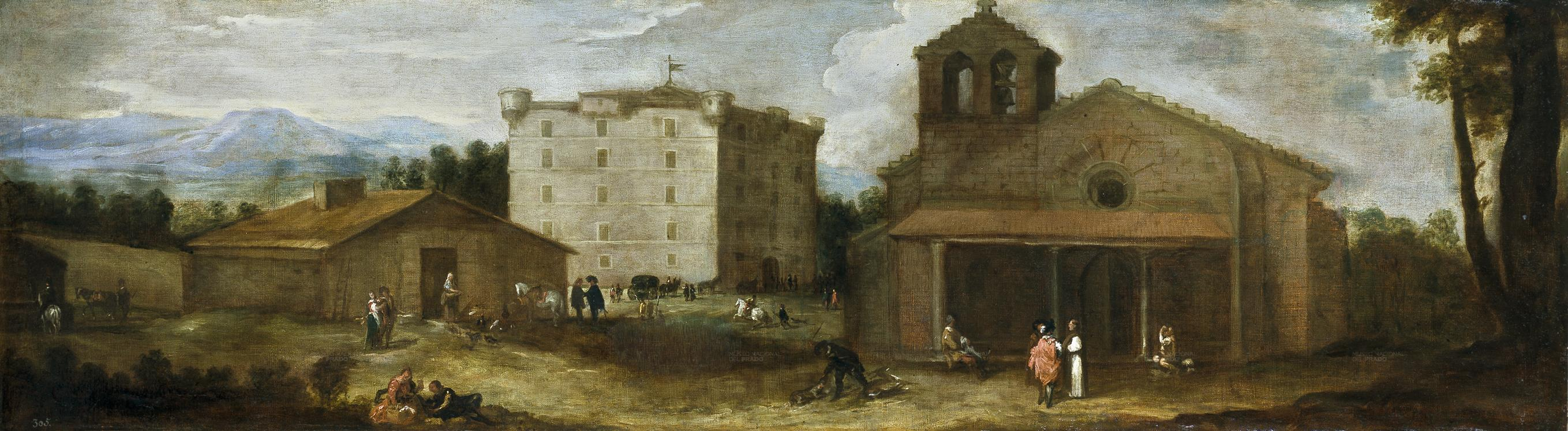 Vista del Campillo, casa de campo de los monjes de San Lorenzo de El Escoriallabel QS:Les,"Vista del Campillo, casa de campo de los monjes de San Lorenzo de El Escorial"